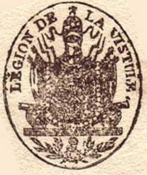 Pieczęć Legii Nadwiślańskiej